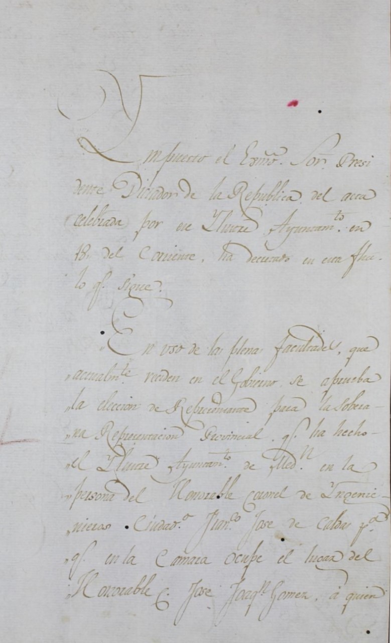 Acta del Concejo de Medellín en que se nombra al Sabio Caldas y a Antonio Arboleda como representantes titular y suplente a la Cámara por Medellín en 1814